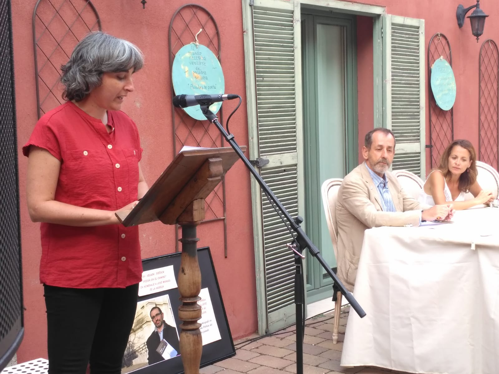 La poeta Daniela Martín Hidalgo interviene en la IX Velada "Poesía en el Camino" celebrada en Olmillos de Sasamón (Burgos) el 10 de agosto de 2019.